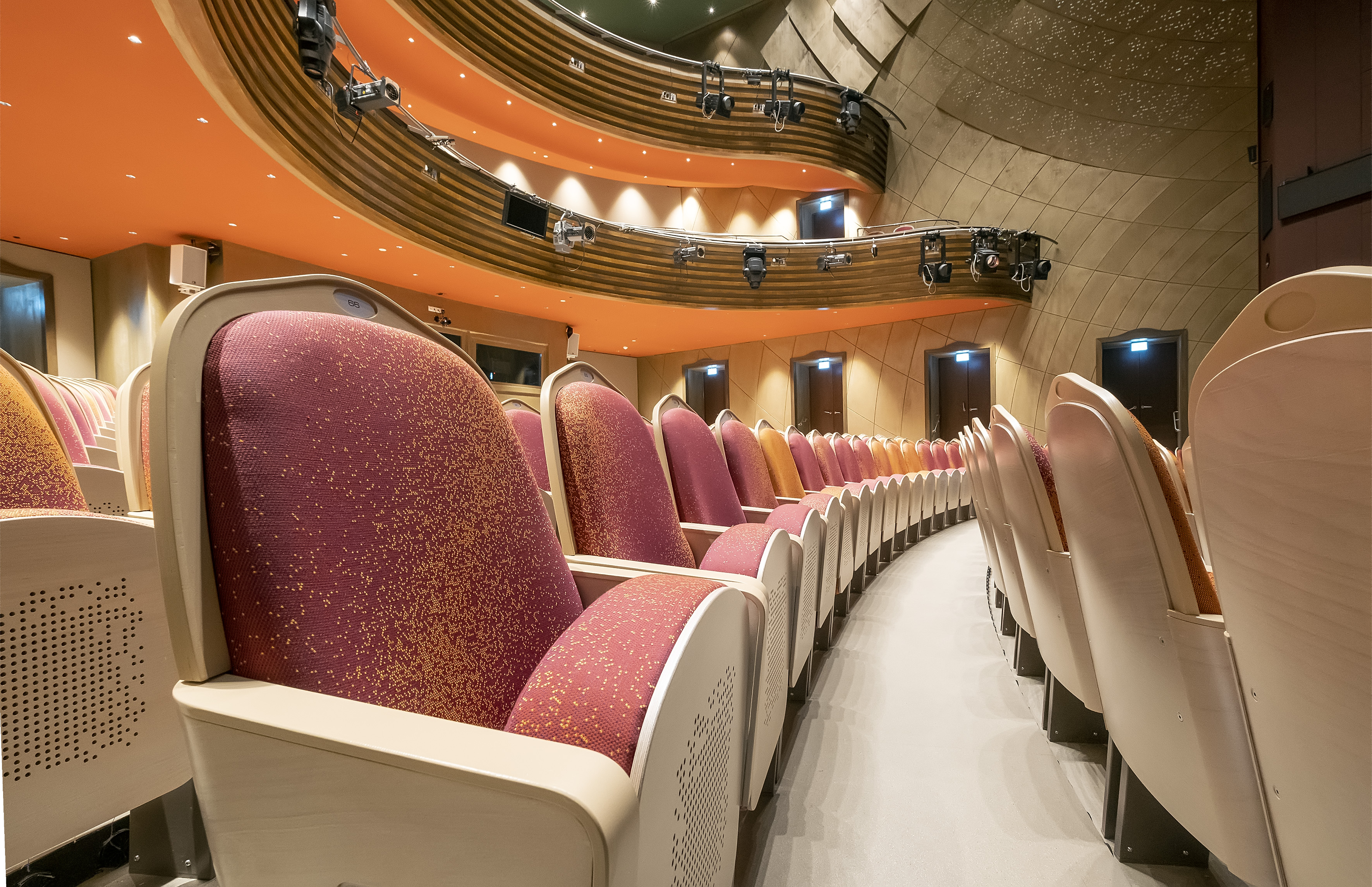 Der Saal nach der Sanierung 2019. Foto: Chris Gossmann